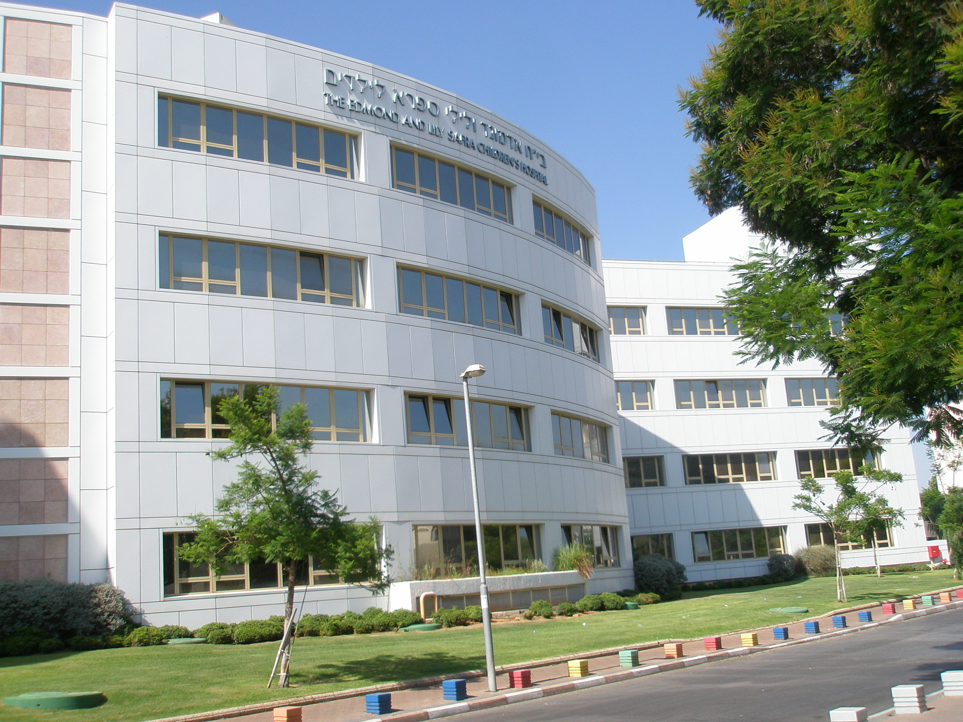 Safra Children Hospital, Sheba Medical Center